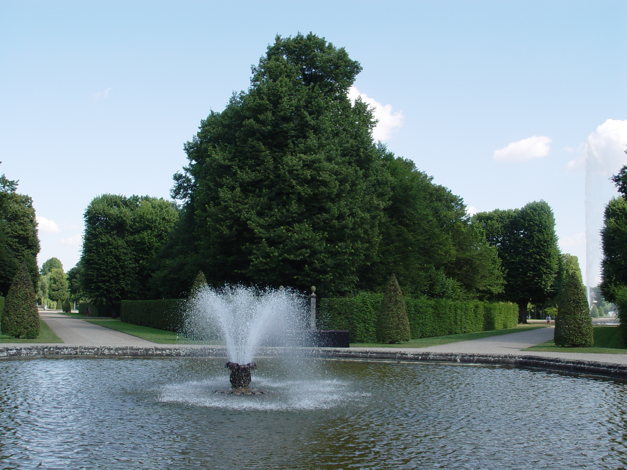 Wege in den Herrenhäuser Gärten